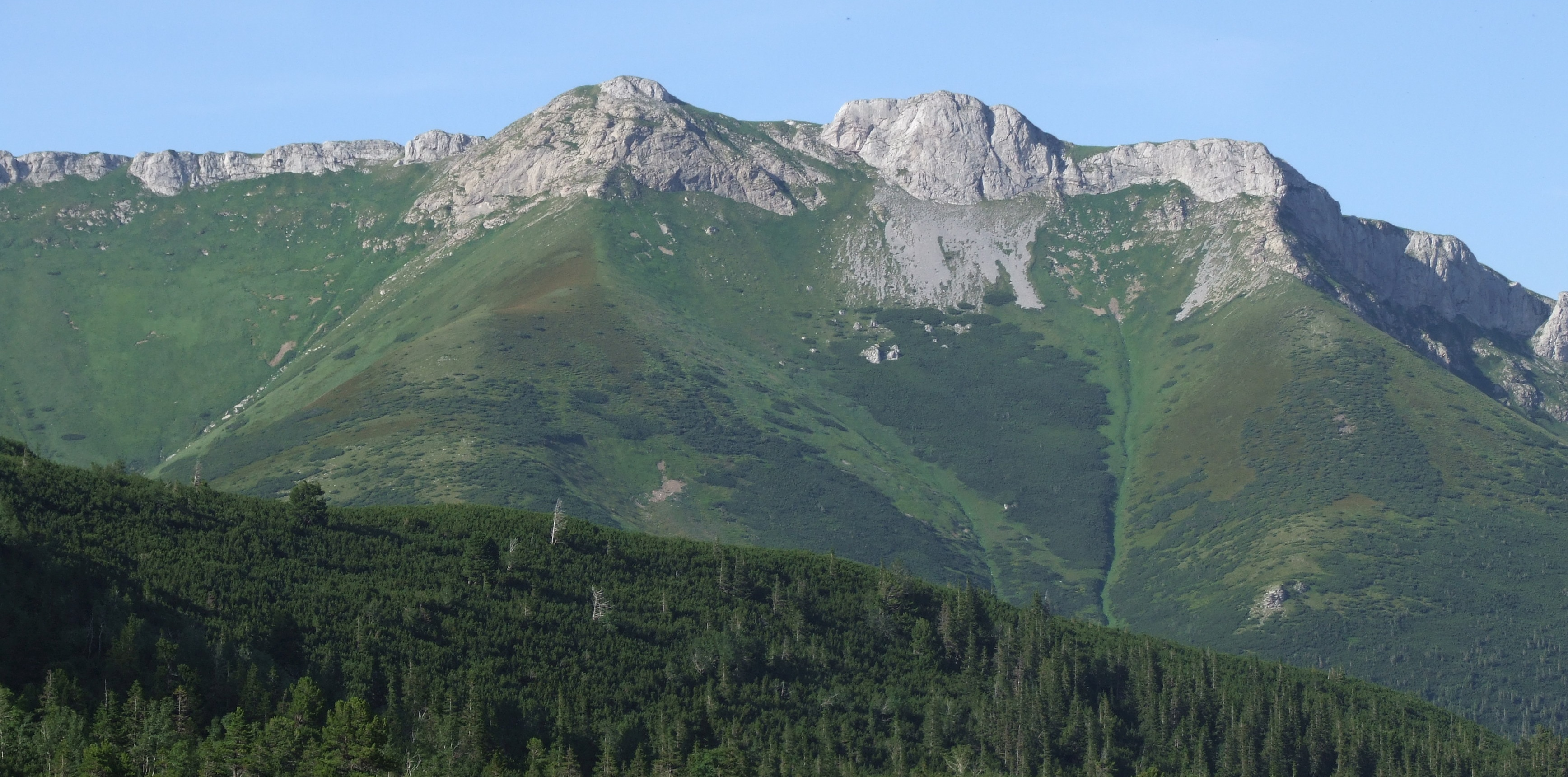 Bielskie Jatki